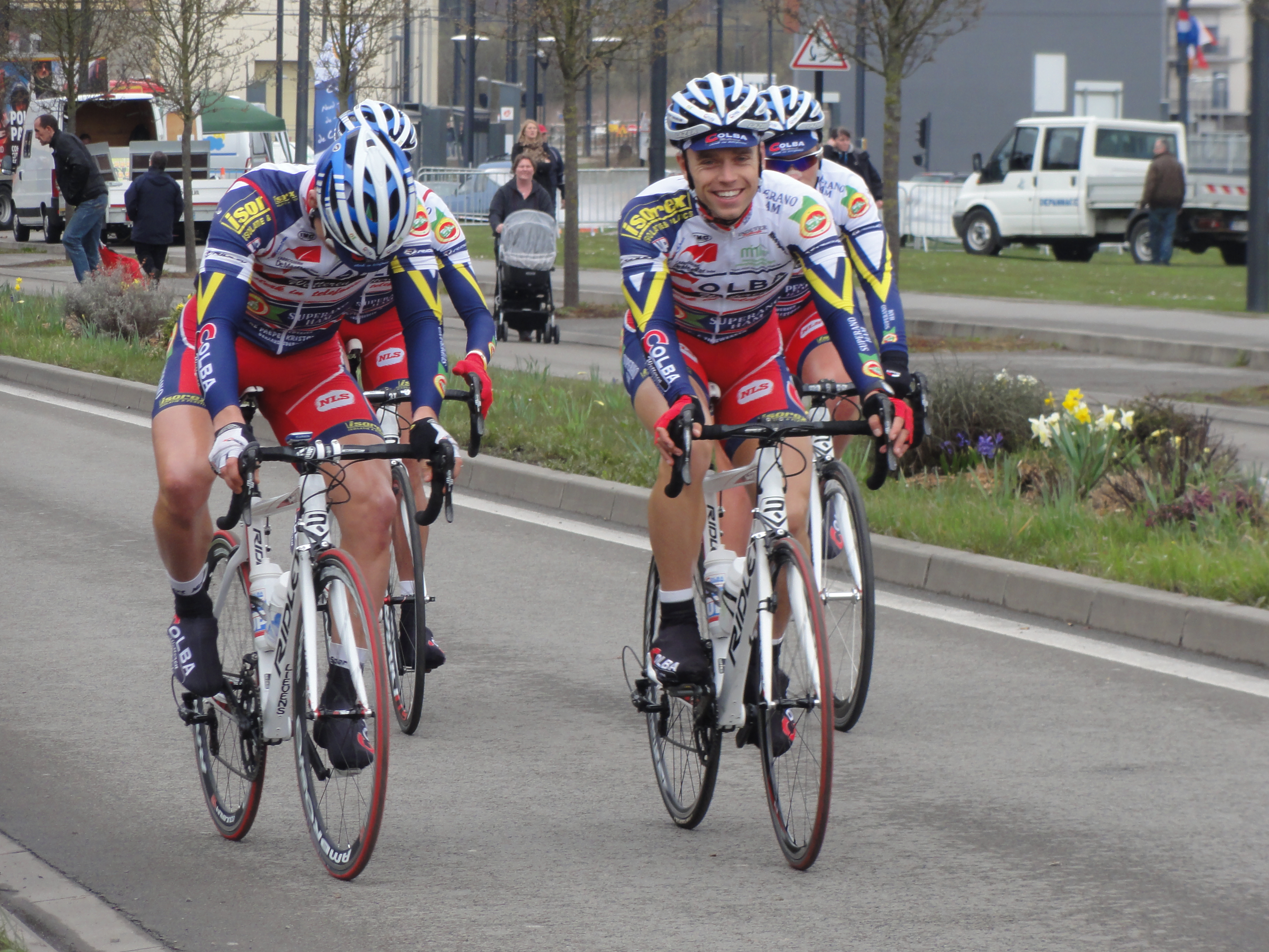 Reportage photographique réalisé le mardi 11 avril 2013 durant l'édition 2013 du Grand Prix de Denain à Denain, Nord, Nord-Pas-de-Calais, France. Depicted person: Aron Kremer